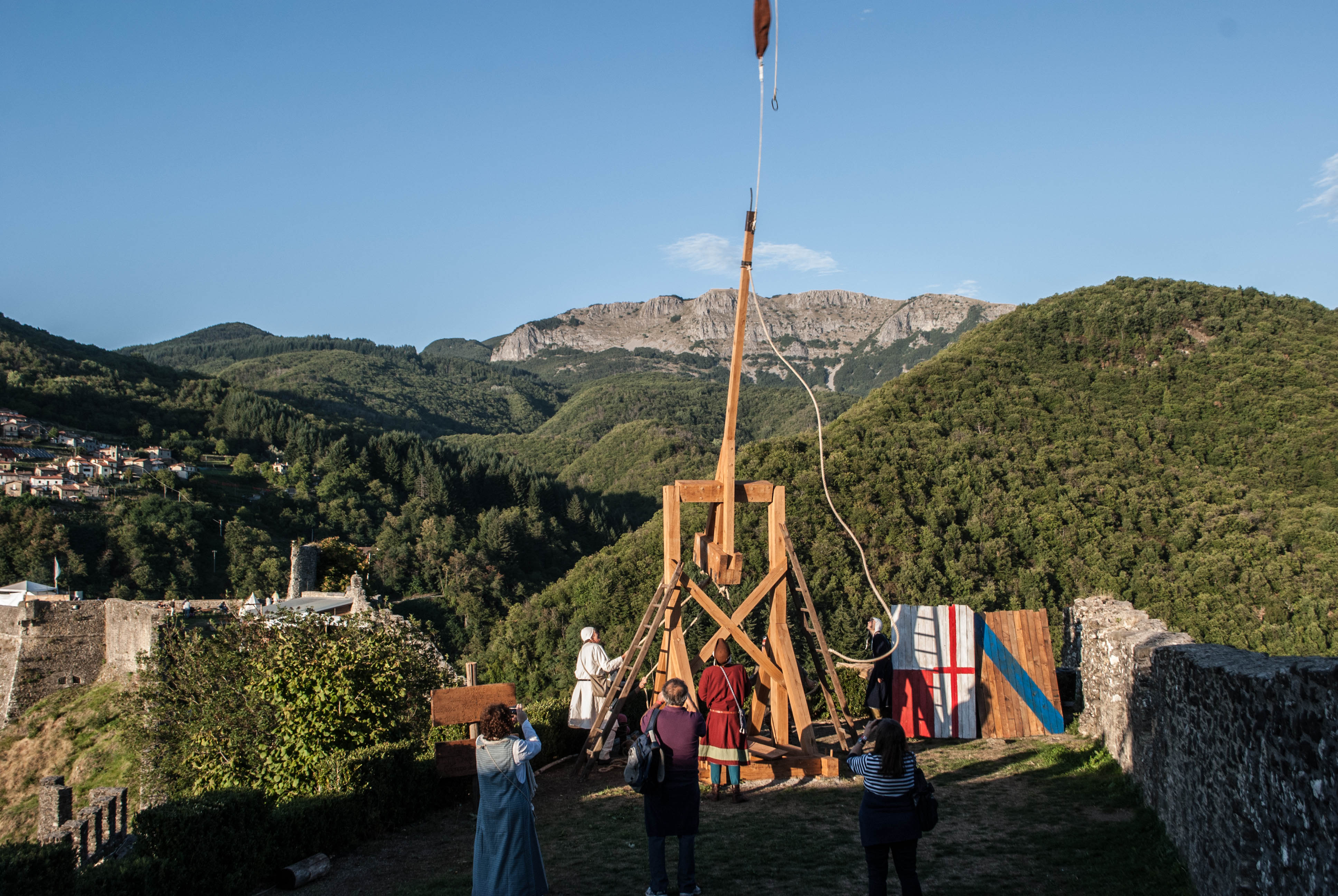 Una "catapulta" fedelmente ricostruita e funzionante This is a photo of a monument which is part of cultural heritage of Italy.